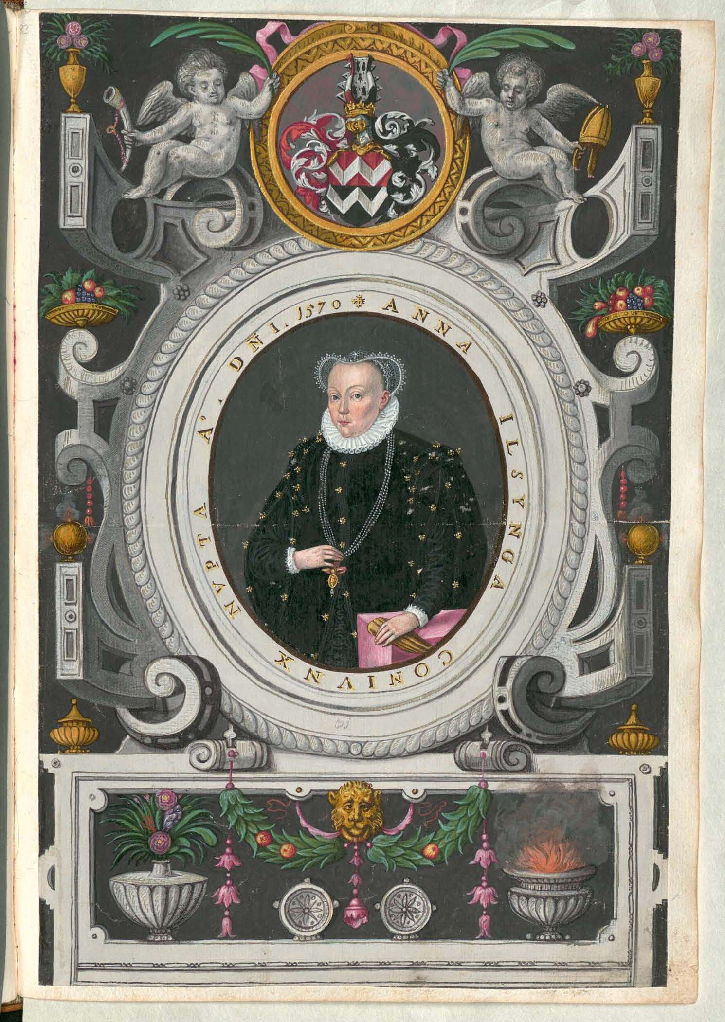 Fuggerorum et Fuggerarum imagines wurde 1588 von Philipp Eduard Fugger beim Kupferstecher Dominicus Custos in Auftrag gegeben. Das Werk enthält mit Aquarell- und Gouache-Farbe kolorierte Stiche der Mitglieder der Fugger von der Lilie. Der Druck von 1618 stellt das einzige kolorierte Exemplar dar.